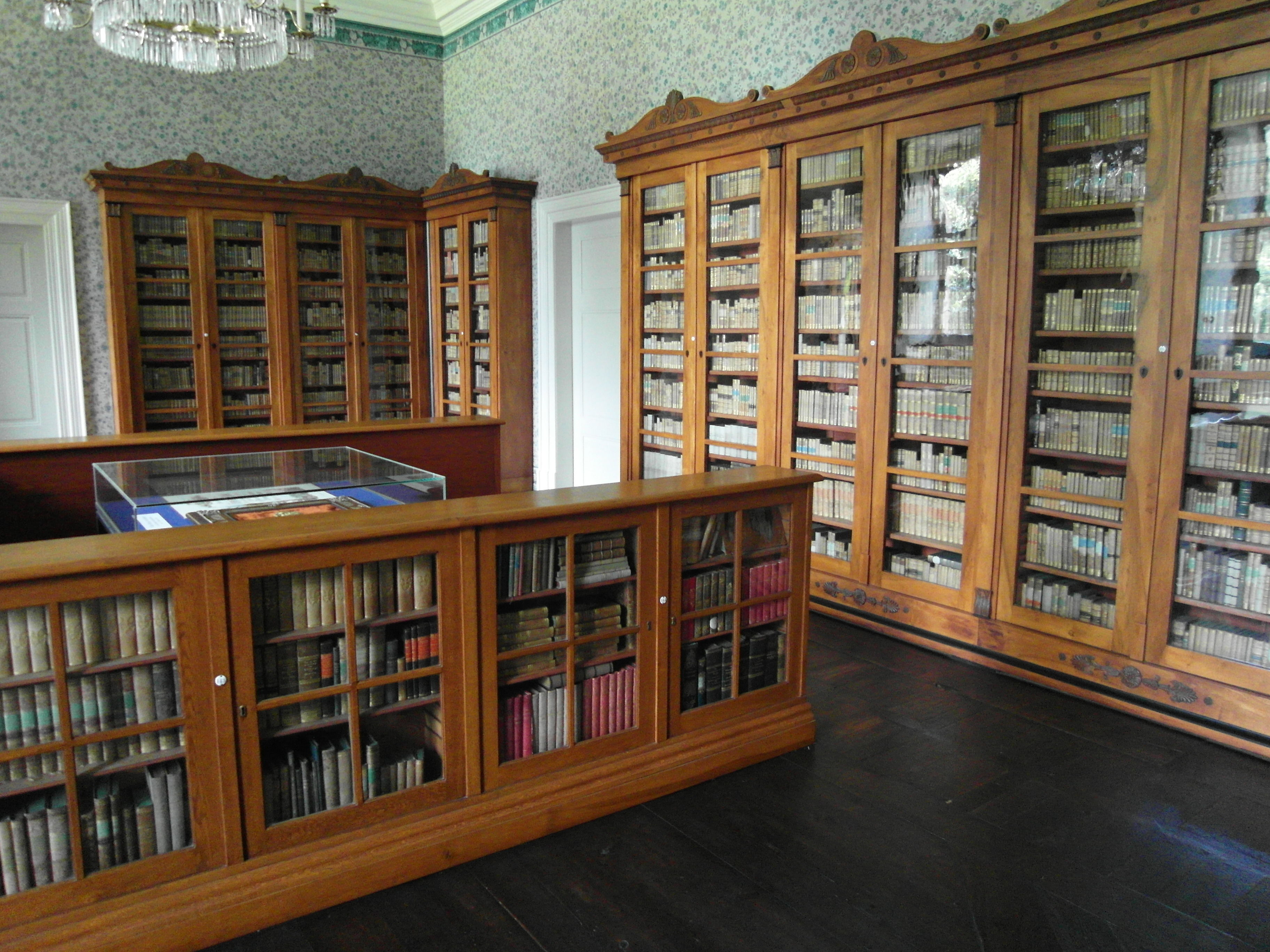 Ein Raum der fürstlichen Bibliothek von Schloß Corvey im Nordflügel